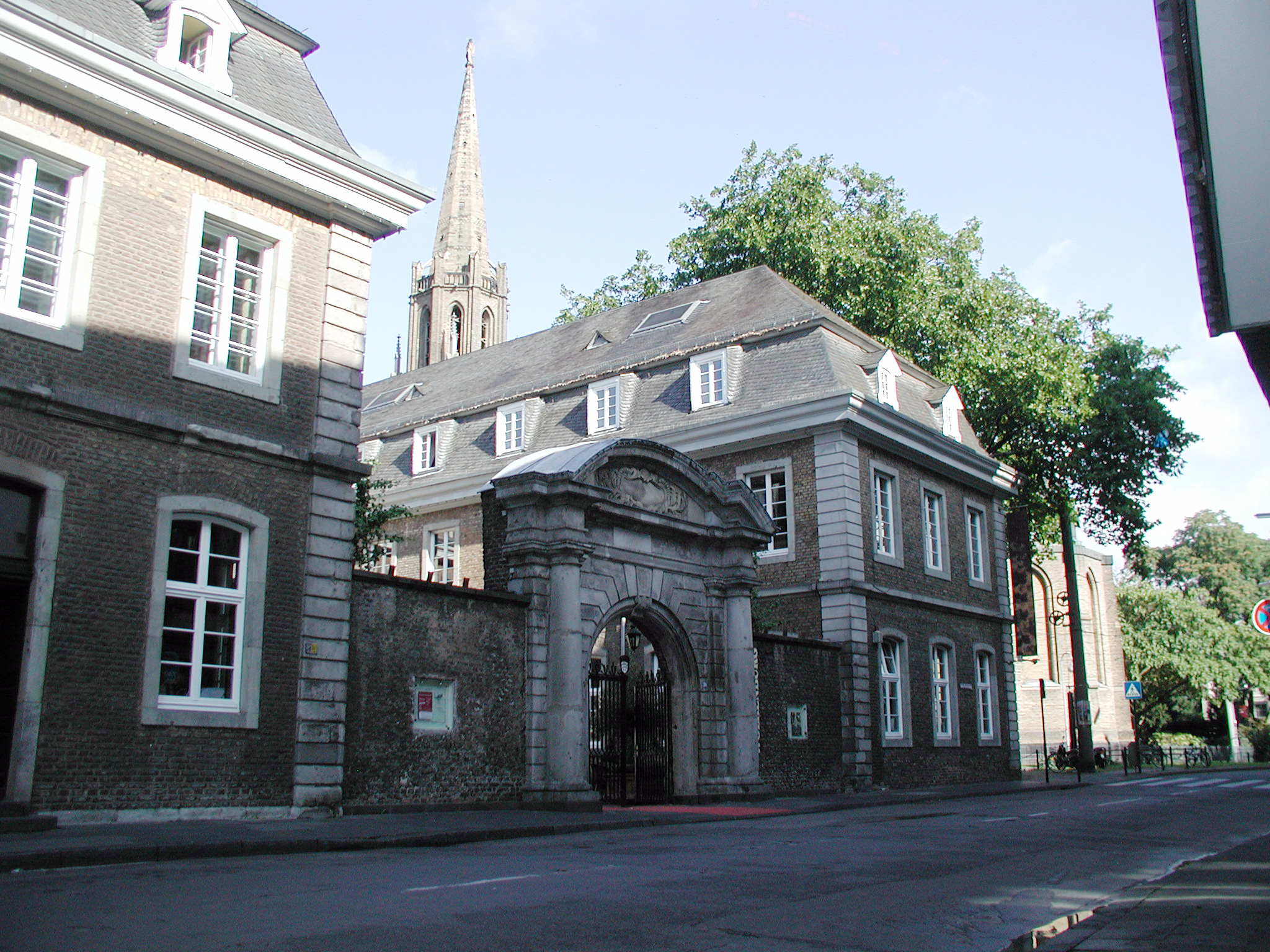 St. Mauritius, Köln ehem. Klostergebäude